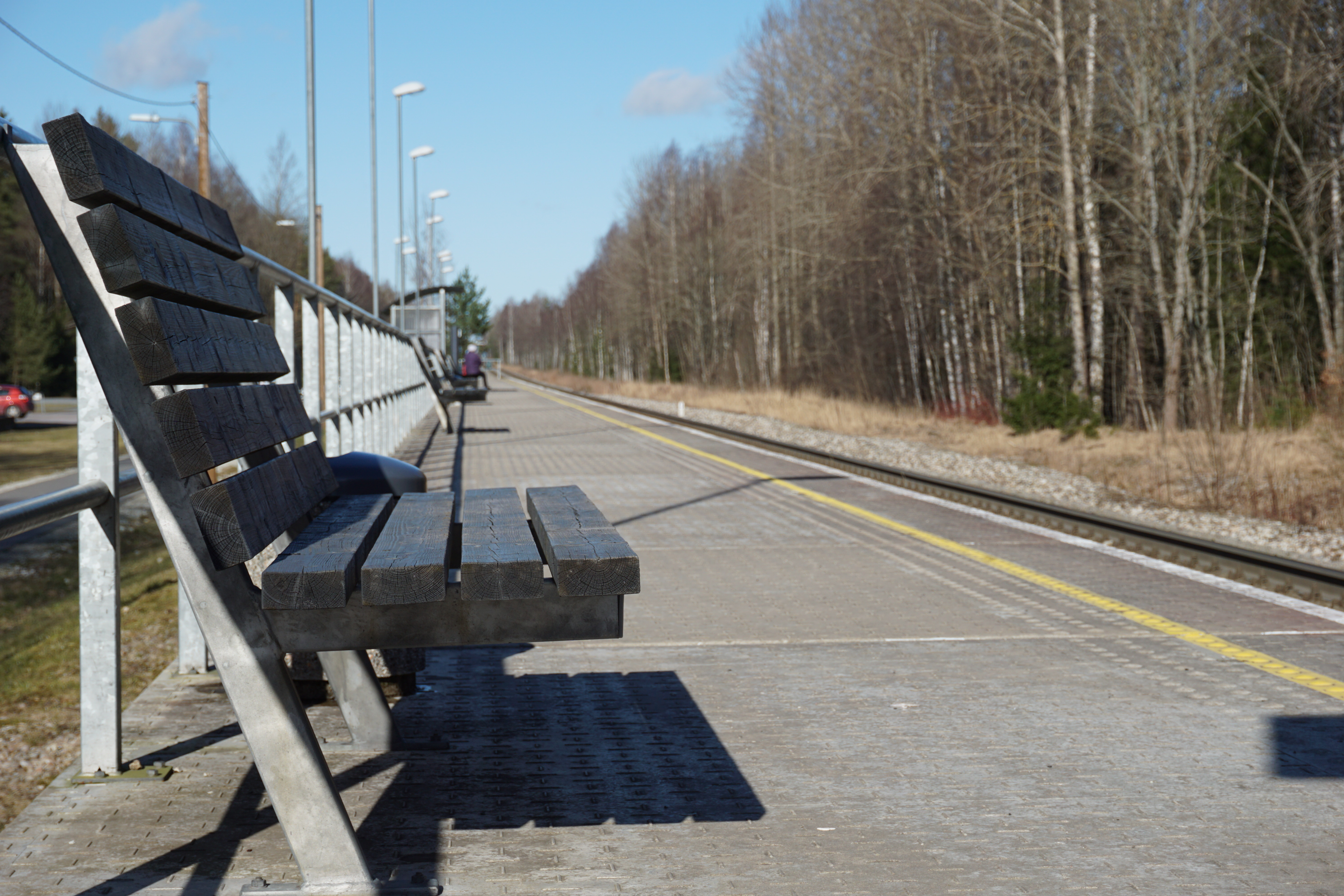 Perroon ehk ooteplatvorm Sakus